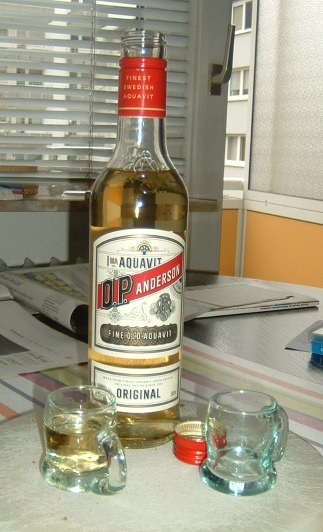 schwedisches Aquavit OP Anderson